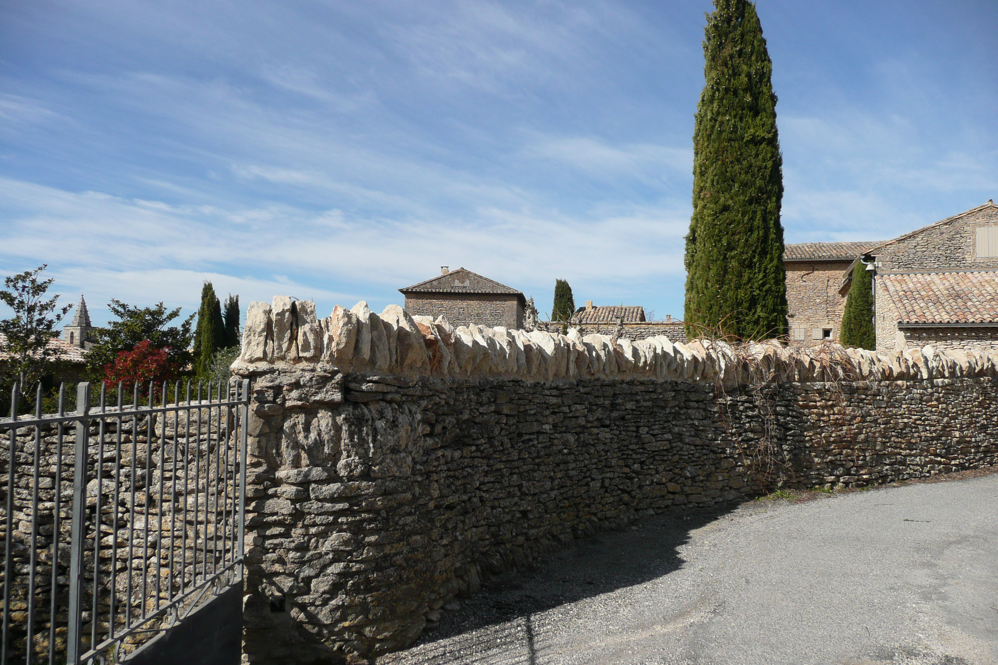 Mur typique à Cabrières d'Avignon.